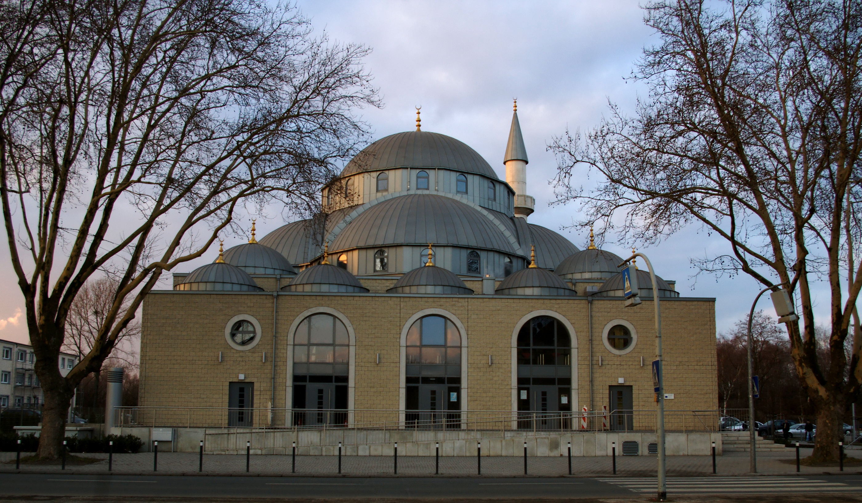 DITIB-Merkez-Moschee in Duisburg-Marxloh, Februar 2010